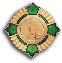 Орден Серафима Саровського Російської православної церкви